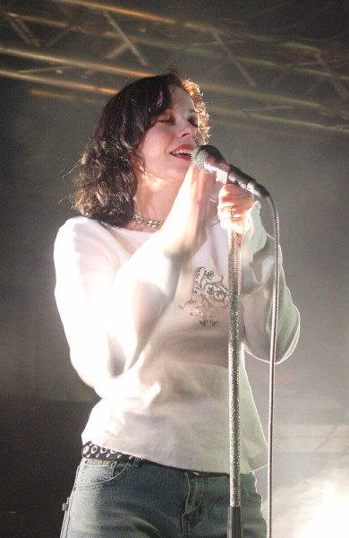 Langjährige The Gathering-Sängerin Anneke in der Ludwigsburger Rockfabrik.